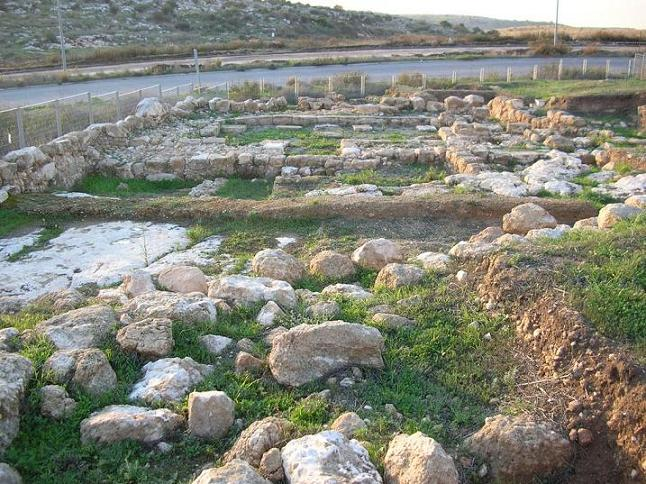 אום אל עומדן, מודיעין